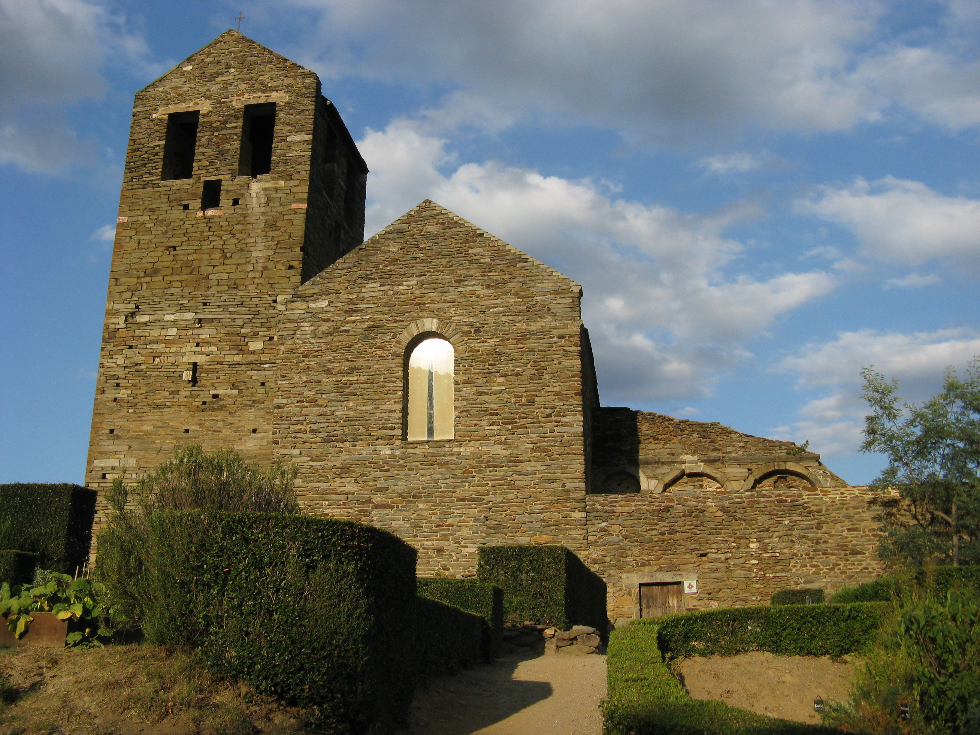 Prieuré de Serrabona à Boule d'Amont